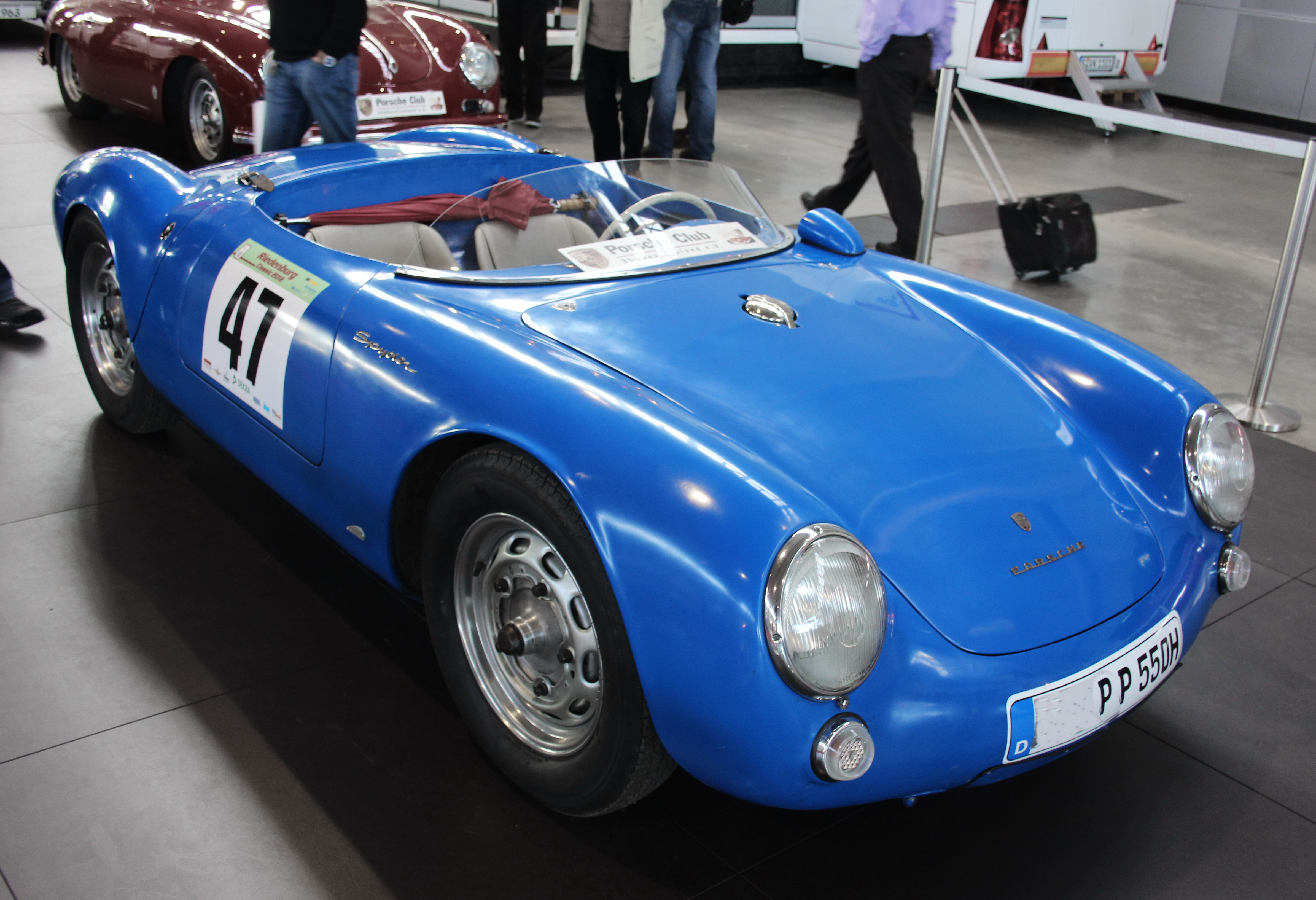 Porsche 550 Spyder 1500 RS auf der Retro Classics in Stuttgart